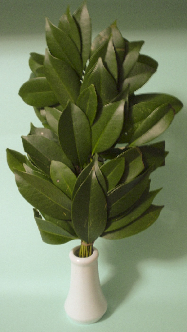 Sakaki's branch with sakaki stand 榊立てに立てたja:榊の枝 2006-03-31